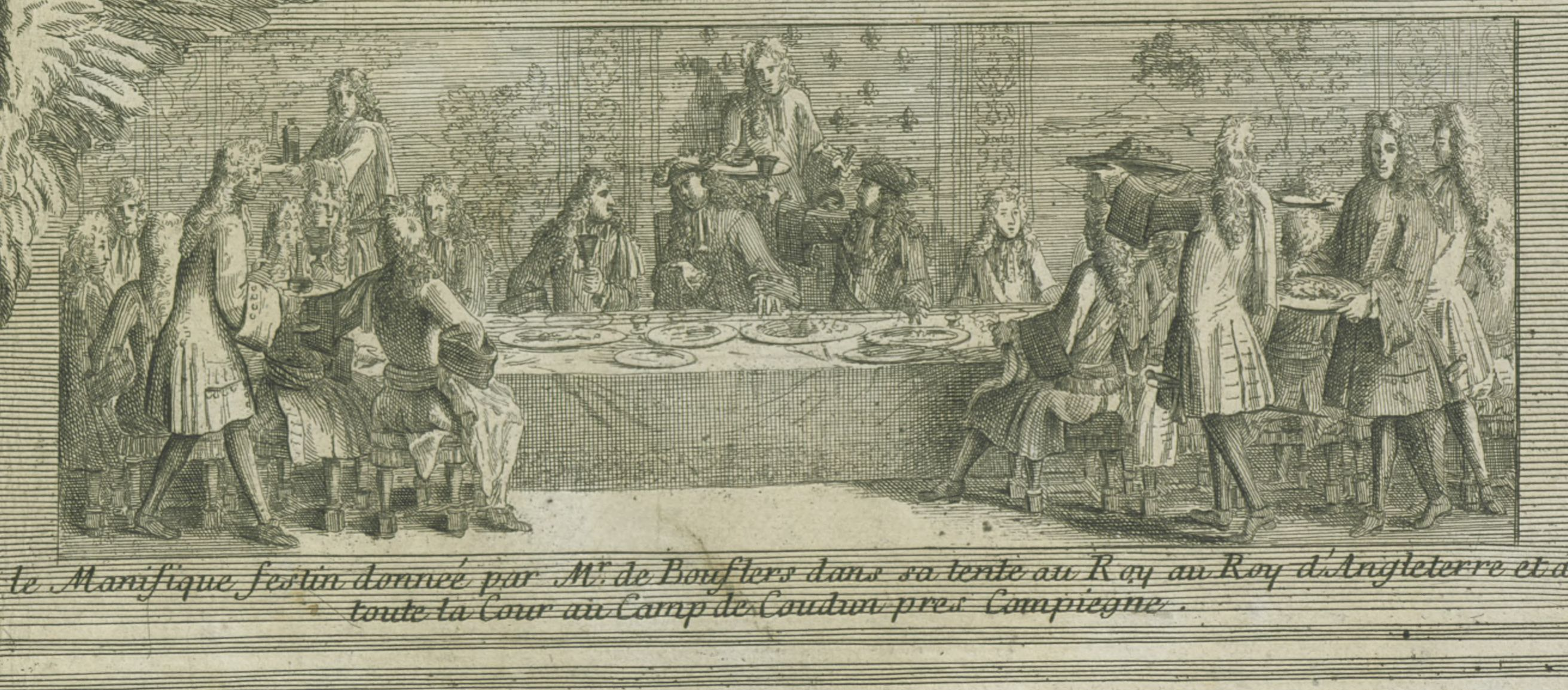 Gravure relatant les réceptions du Maréchal Boufflers lors du Camp de Coudun